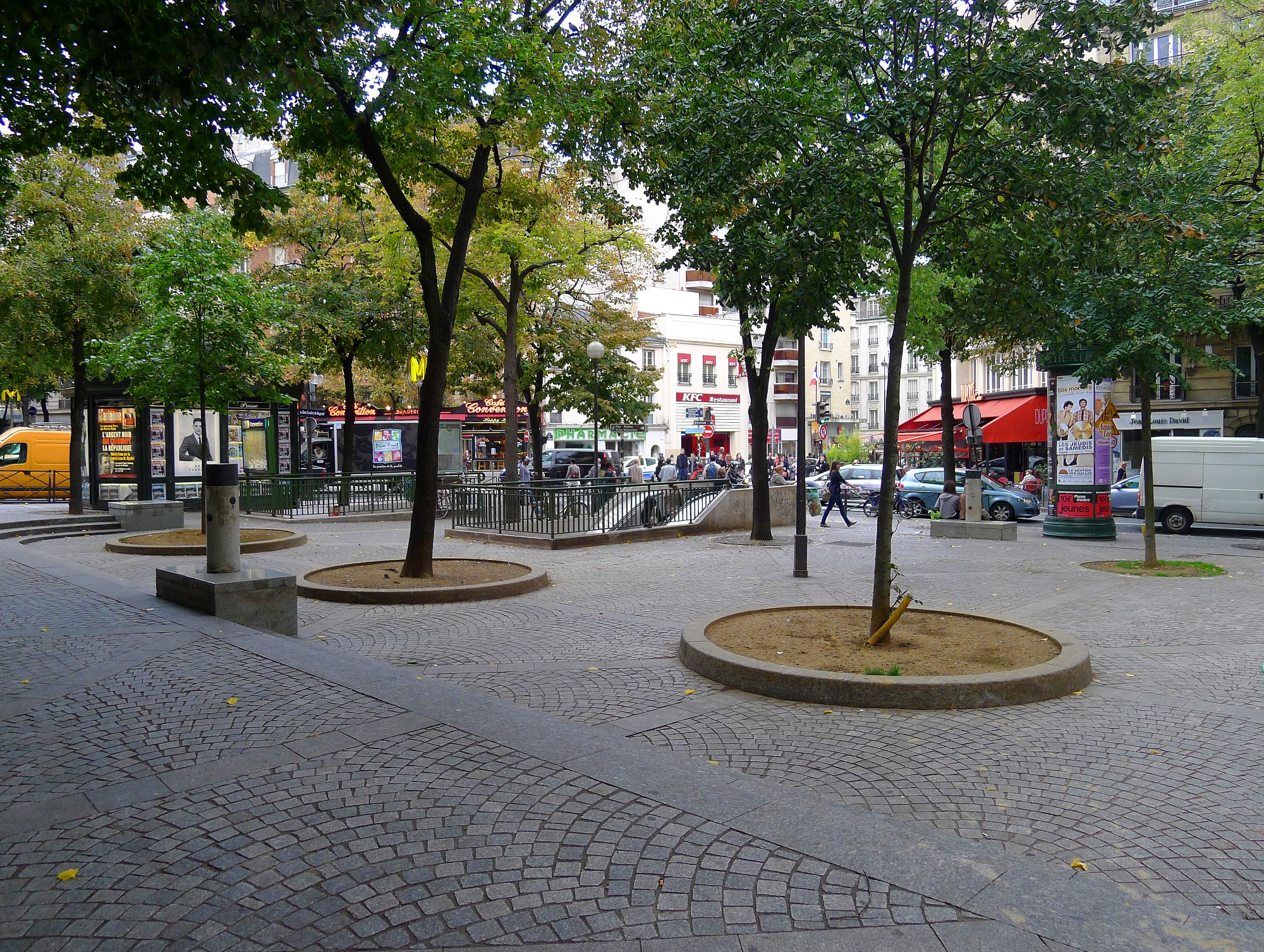 Square du métro Convention (carrefour Convention-Vaugirard) - Paris XV